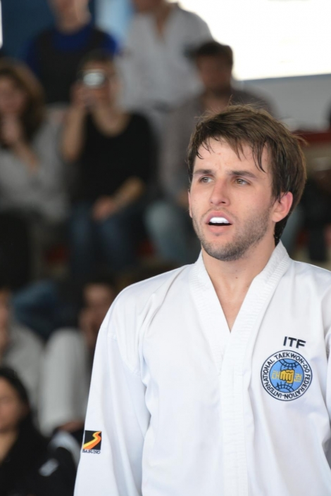 Димитър Христов, таекуон-до, кик бокс